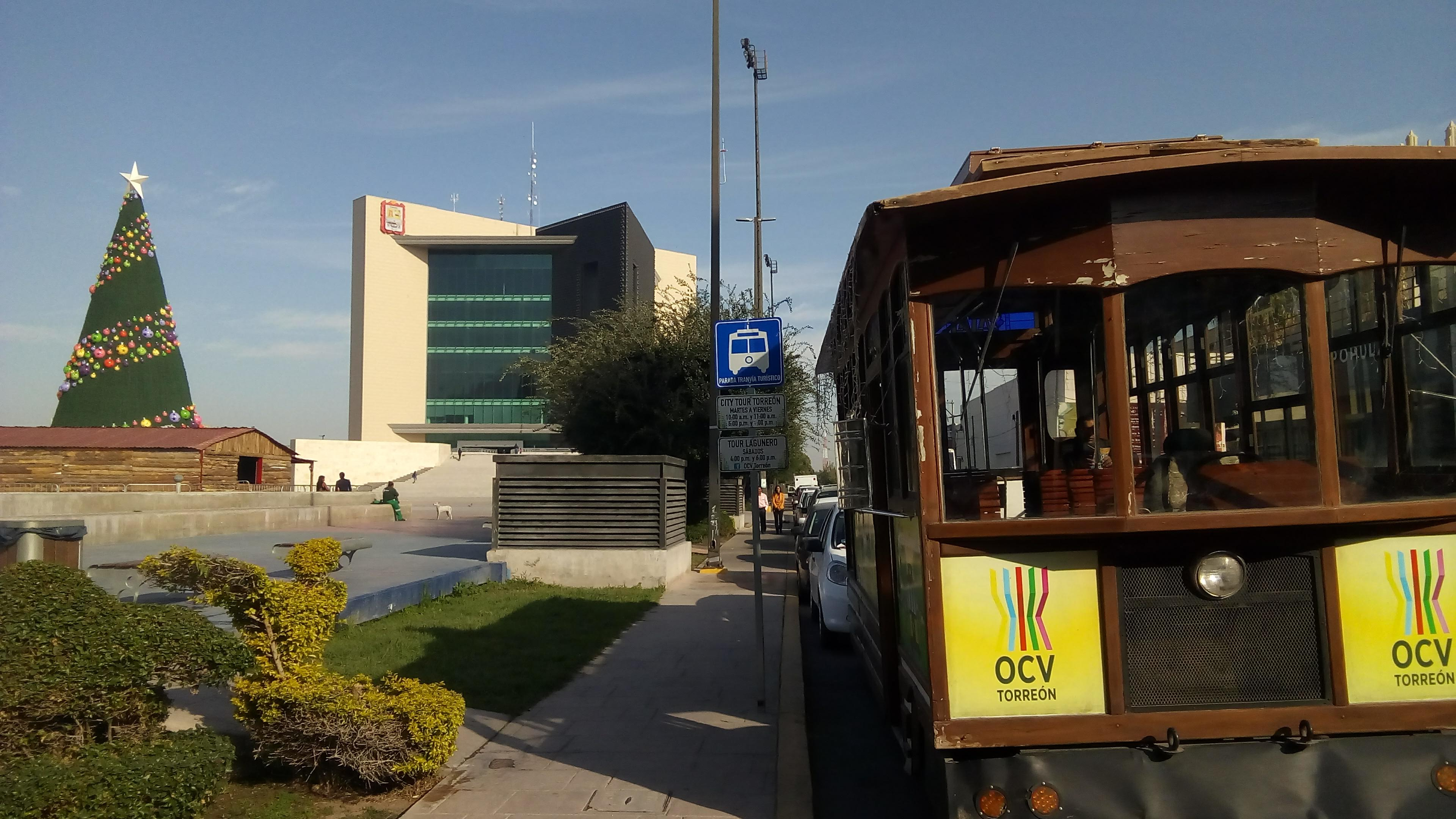 paseo turistico